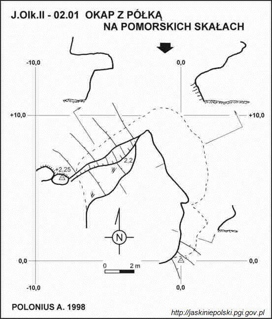 Okap z Półką na Pomorskich Skałach - plan